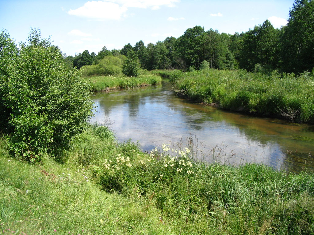 Ashmianka river, Belarus